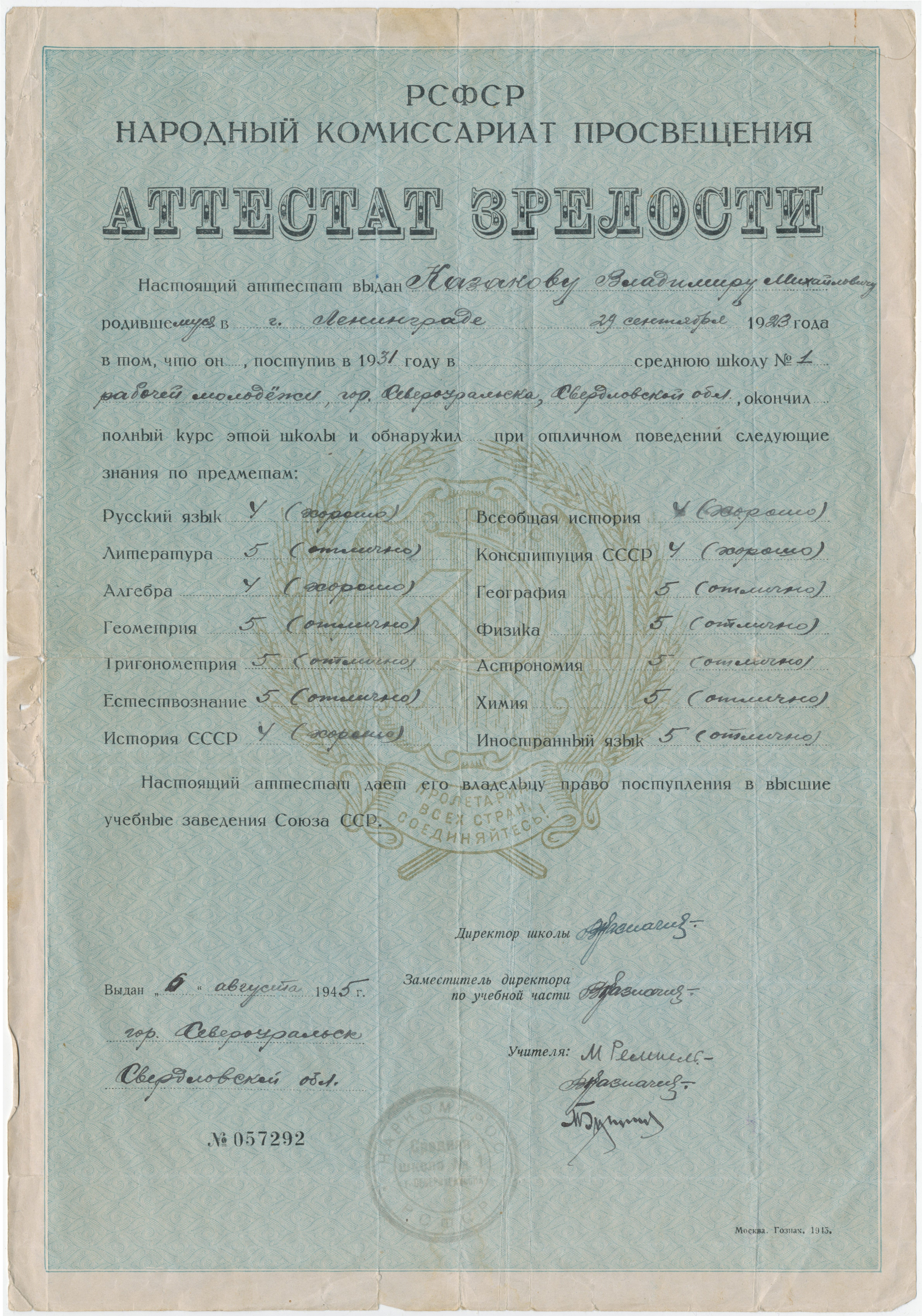 Аттестат зрелости Казакова Владимира Михайловича (1923-2001), слесаря бокситового рудника месторождения «Красная Шапочка», выданный в 1945 году средней школой № 1 рабочей молодёжи г. Североуральска Свердловской области.